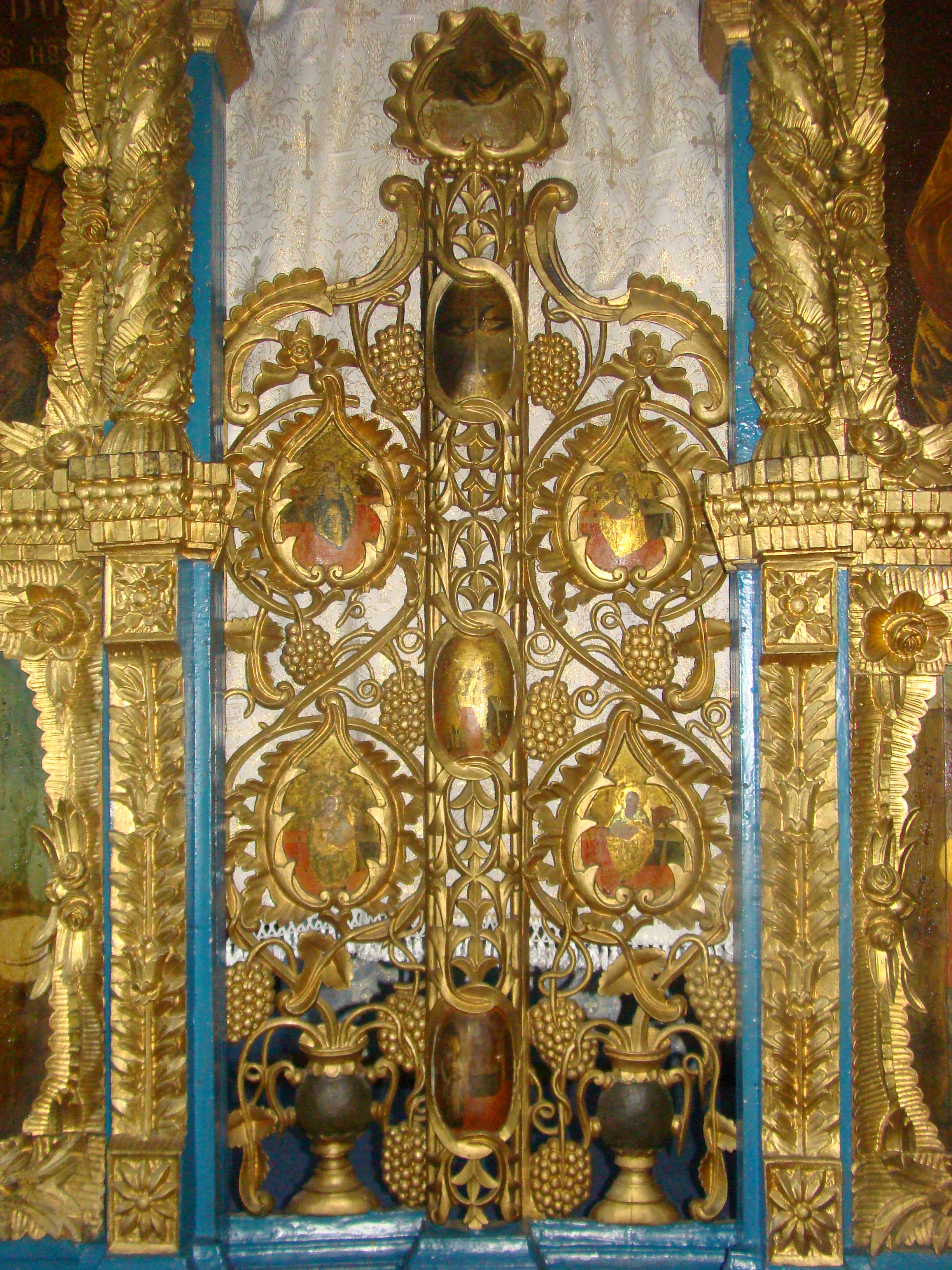 Mănăstirea Dălhăuți, Vrancea